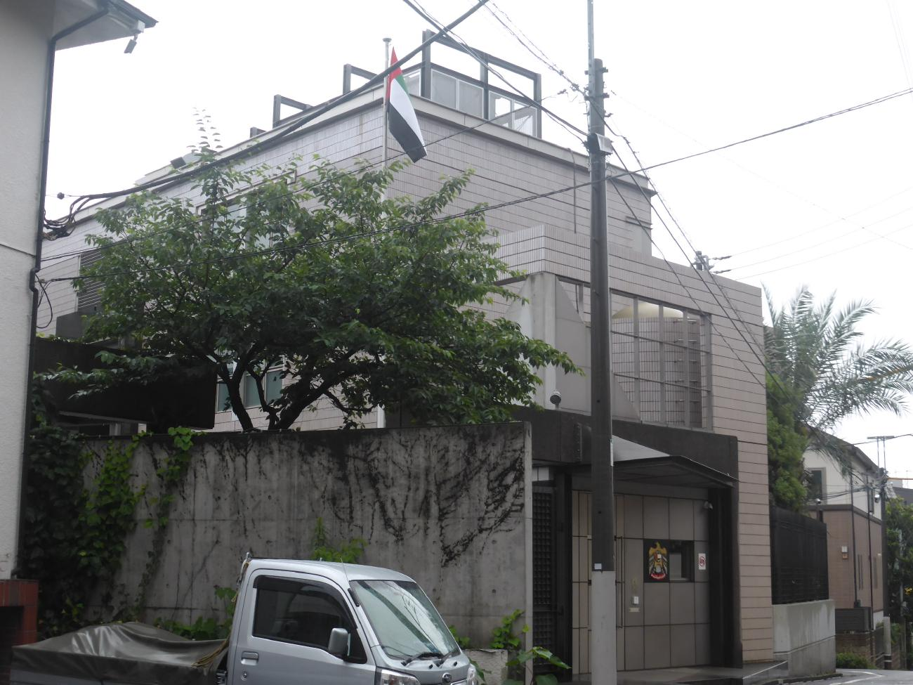 UAE国旗と玄関